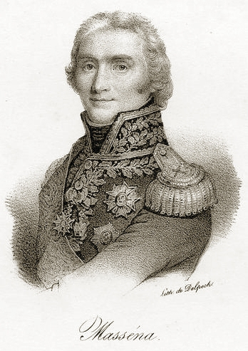 André Masséna (1756–1817), Marschall von Frankreich, Herzog von Rivoli und Fürst von Essling